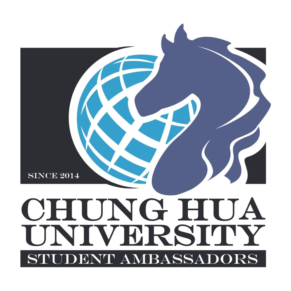 中華大學學生大使團團徽，以馬呼應校徽，馬身後的地球則代表團員皆能步入國際、邁向國際化。